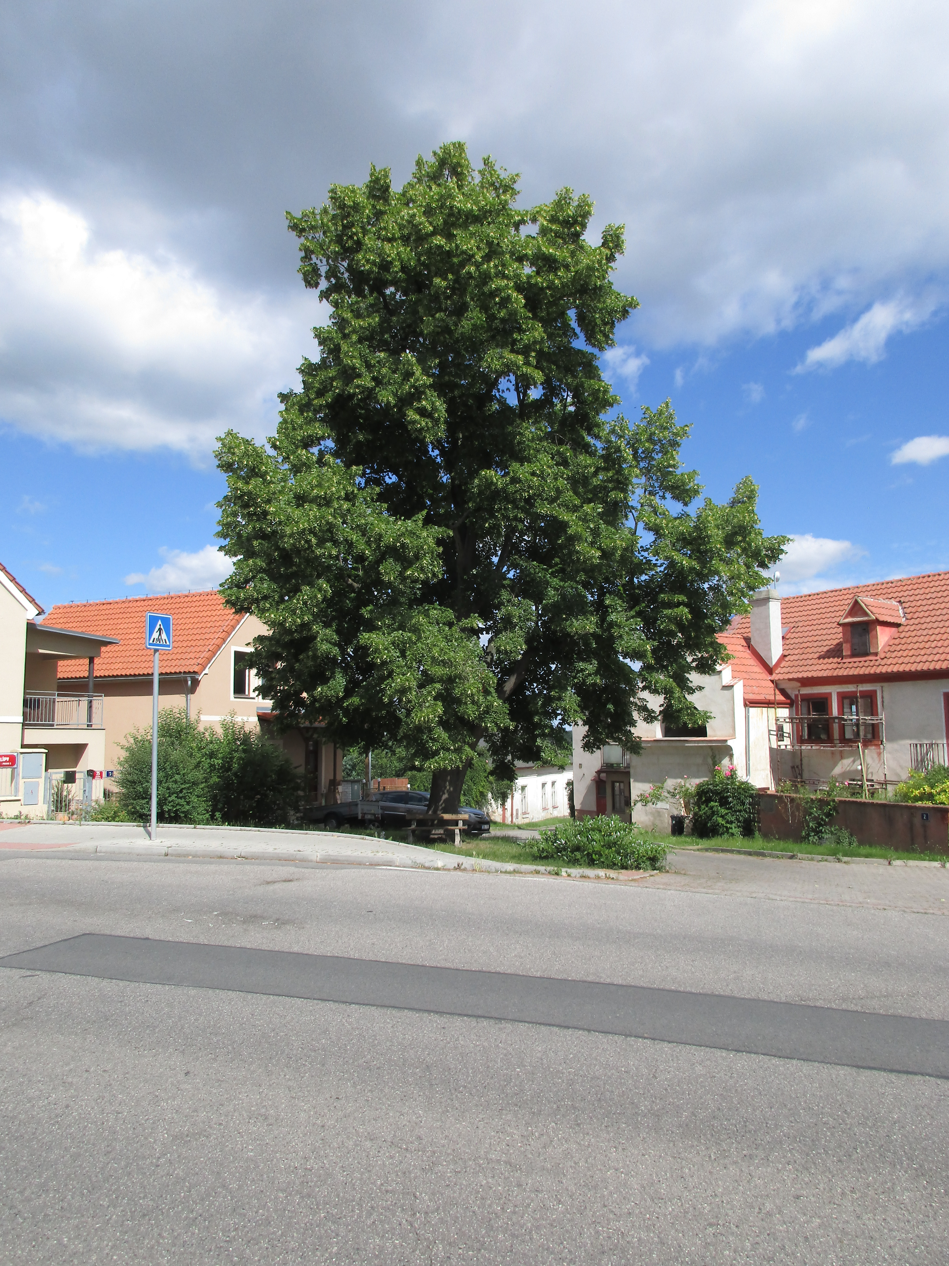 Lípa velkolistá (Tilia platyphyllos Scop.). Praha 6 - Zličín, ulice U Lípy. Vysazena roku 1919 na památku vzniku Československé republiky. Významný strom, evidenční číslo MHMP: 46, v databázi od roku 2014.